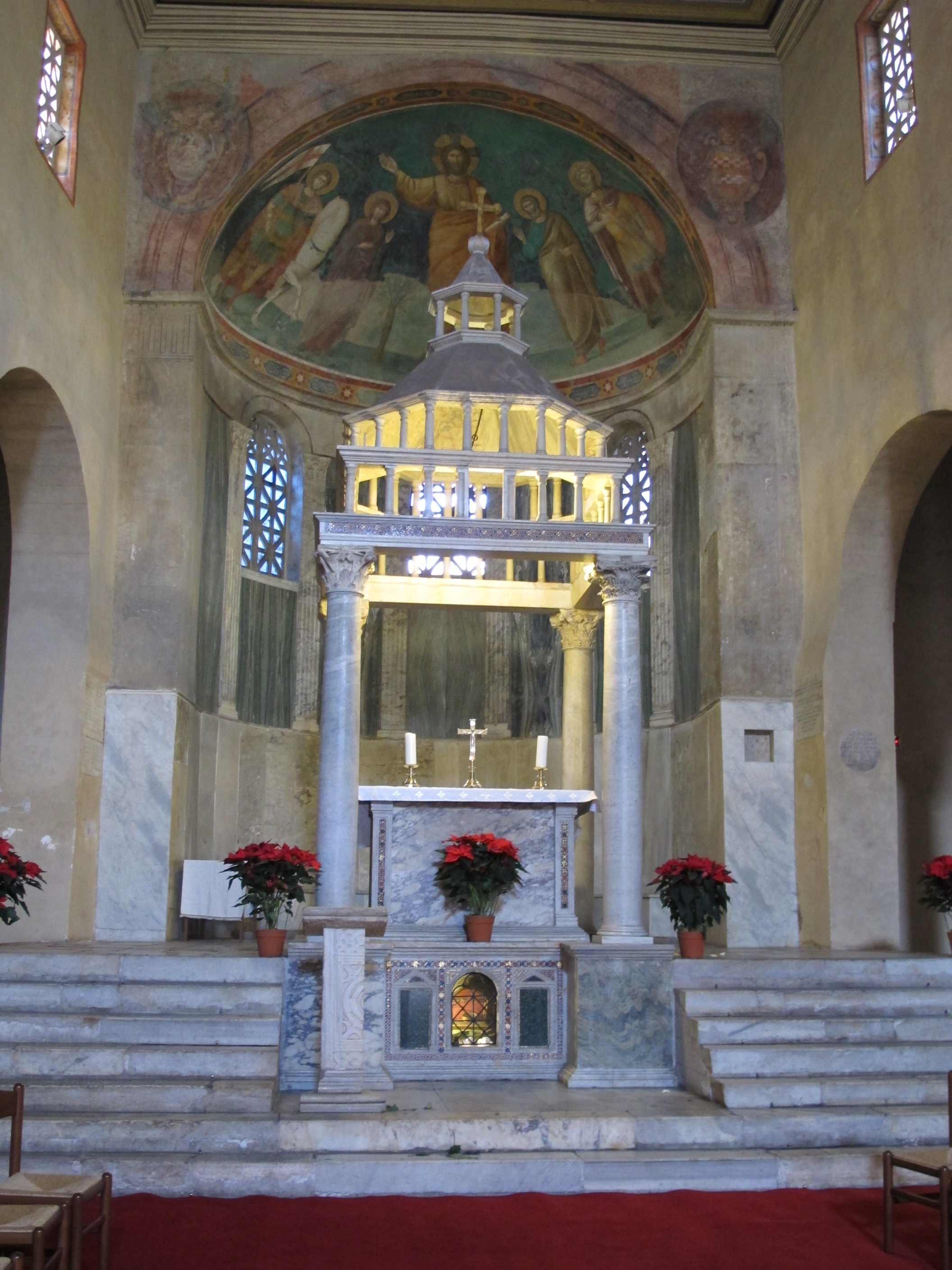 San giorgio al velabro, interno